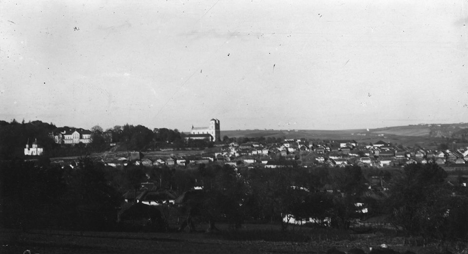 Церква, замок, костел - Вишнівець